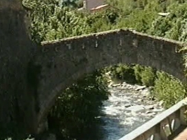 Bildbeschreibung: Têt bei Villefranche-de-Conflent Quelle: selbst gefilmt Fotograf/Zeichner: Matthias Holländer Datum: Sommer 2002 Sonstiges: ...